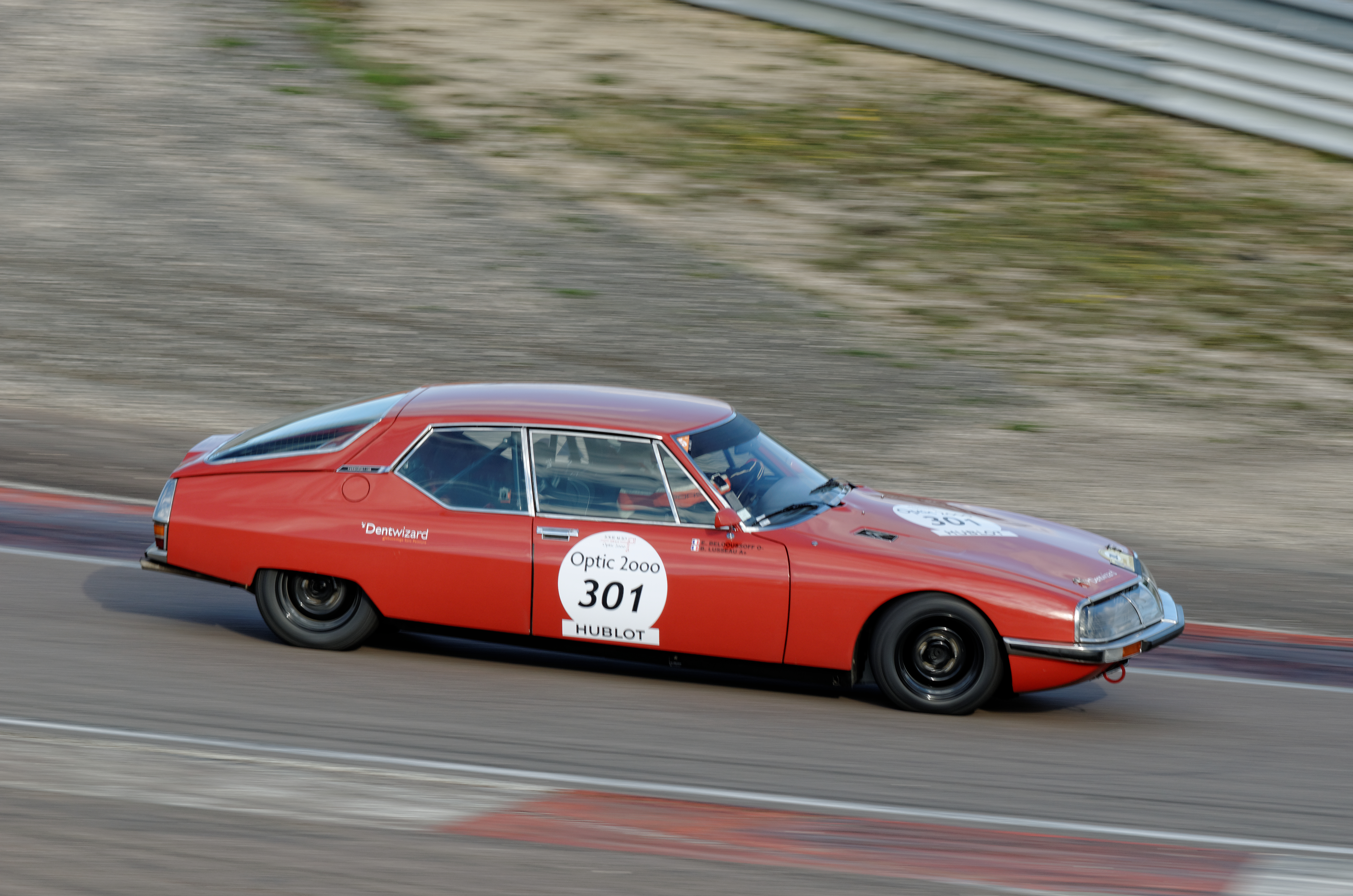 Citroen SM, Tour Auto 2014, étape sur le Circuit de Prenois.